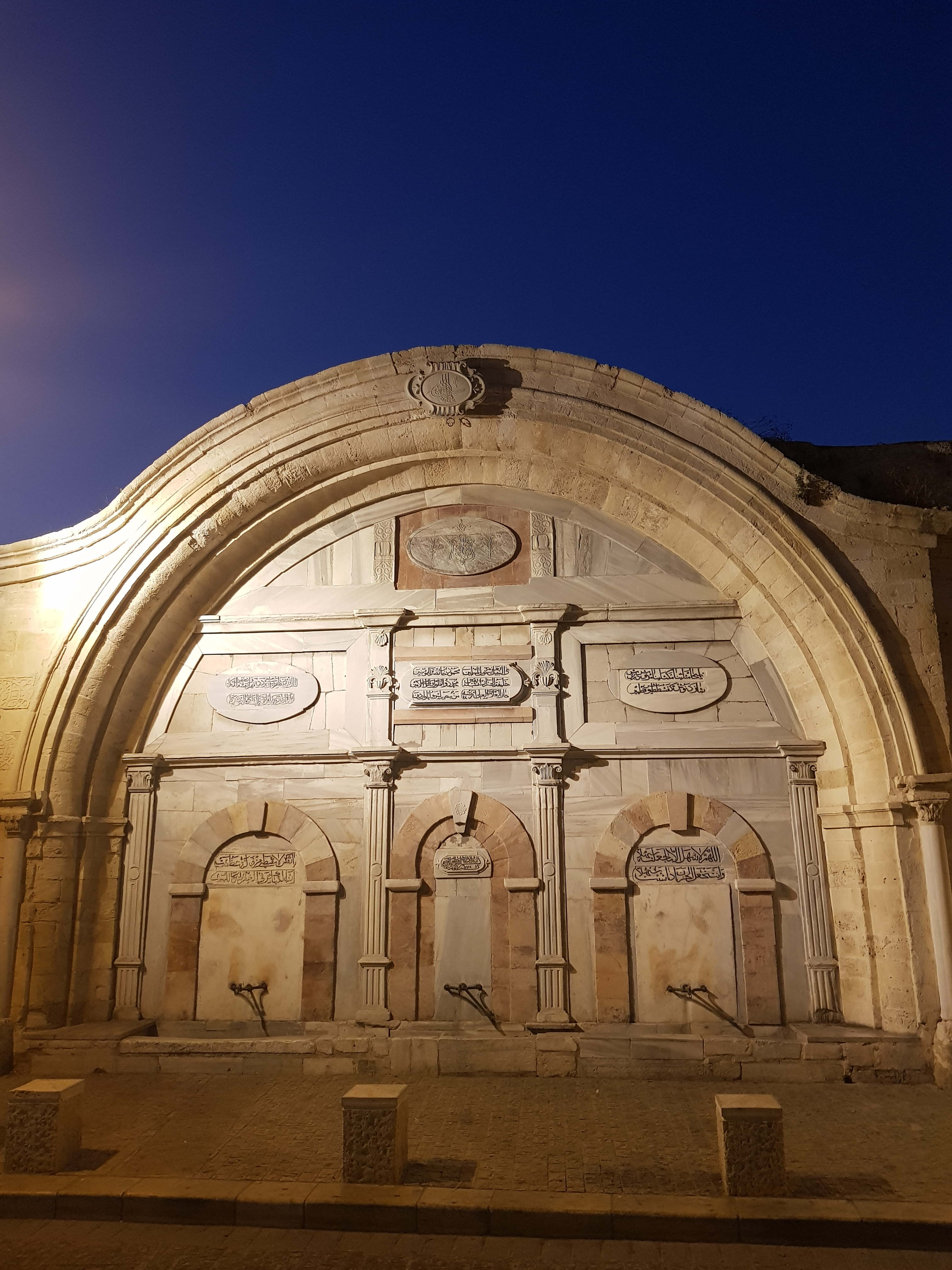 בקיר הדרומי של מסגד מחמודיה קבוע "סביל סולימאן" שצורתו כשל קשת גדולה המשלבת אבני שיש לבנות וגרניט ורודה. הסביל מעוטר בקשתות, בעמודים ובכותרות וכן בכתובות ובטורה של הסולטאן העות'מאני. הסביל נבנה בשנת 1809 והוצמד אל קיר המסגד משזה הוקם. הוא קרוי על שמו של סולימאן פאשה, שליט עכו ומפקדו של אבו נבוט, אשר הקים אותו.